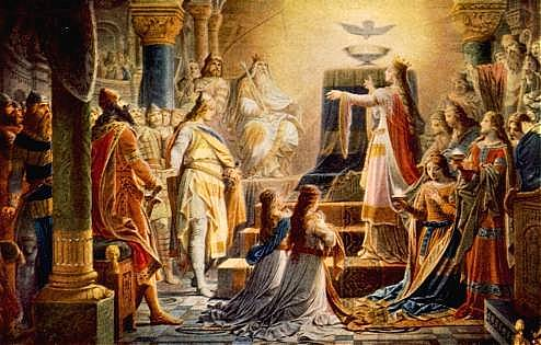 Wilhelm Hauschild (1827-1887) Wandgemälde "Das Gralswunder" Schloss Neuschwanstein, Bayern